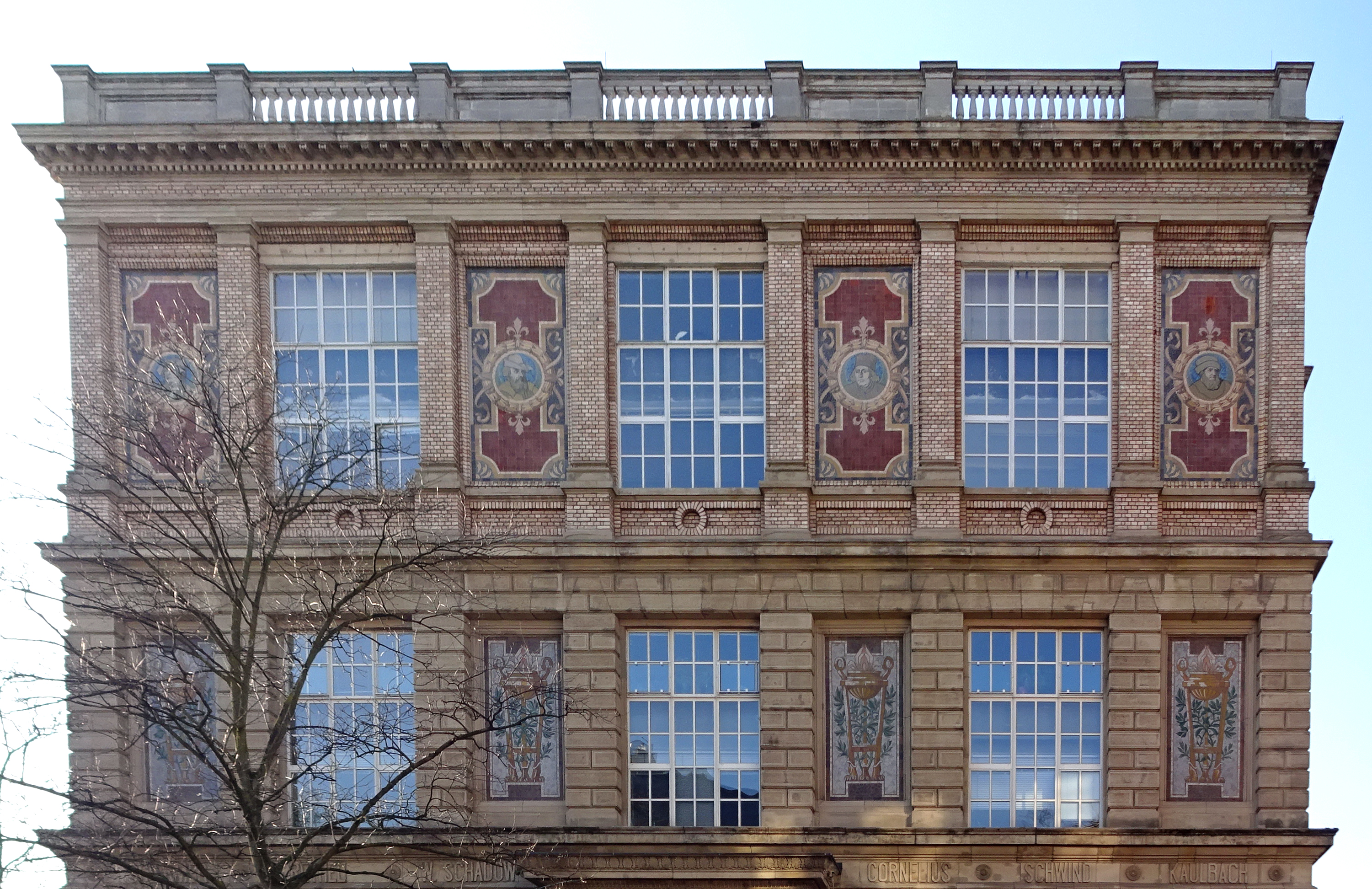 Kunstakademie Düsseldorf Ostseite Haupteingang Eiskellerberg. Tonstiftmosaike mit Abbildung von Künstlern, so wie Mosaike Flammenschalen und Kandelaber. Gefertigt nach Angaben von Adolf Schill, Ende der 1890er Jahre. Fries mit Namen Schirmer, Rethel, W. Schadow, Cornelius, Schwind, Kaulbach